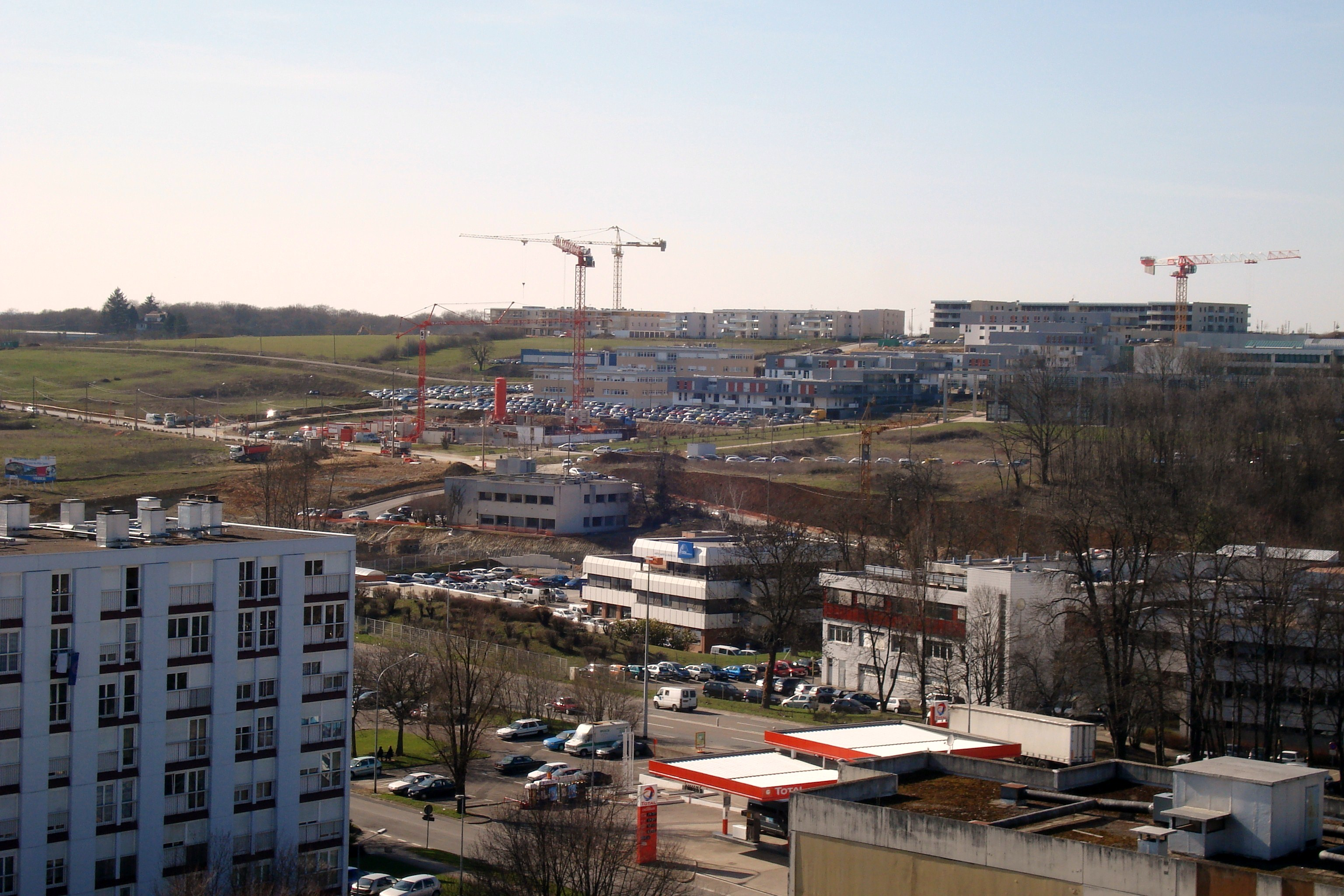 Les Hauts du Chazal à Besançon (Doubs, France).